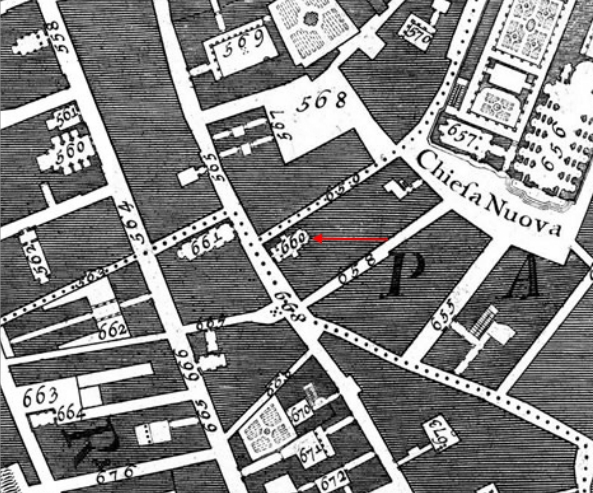 Pianta di Nolli